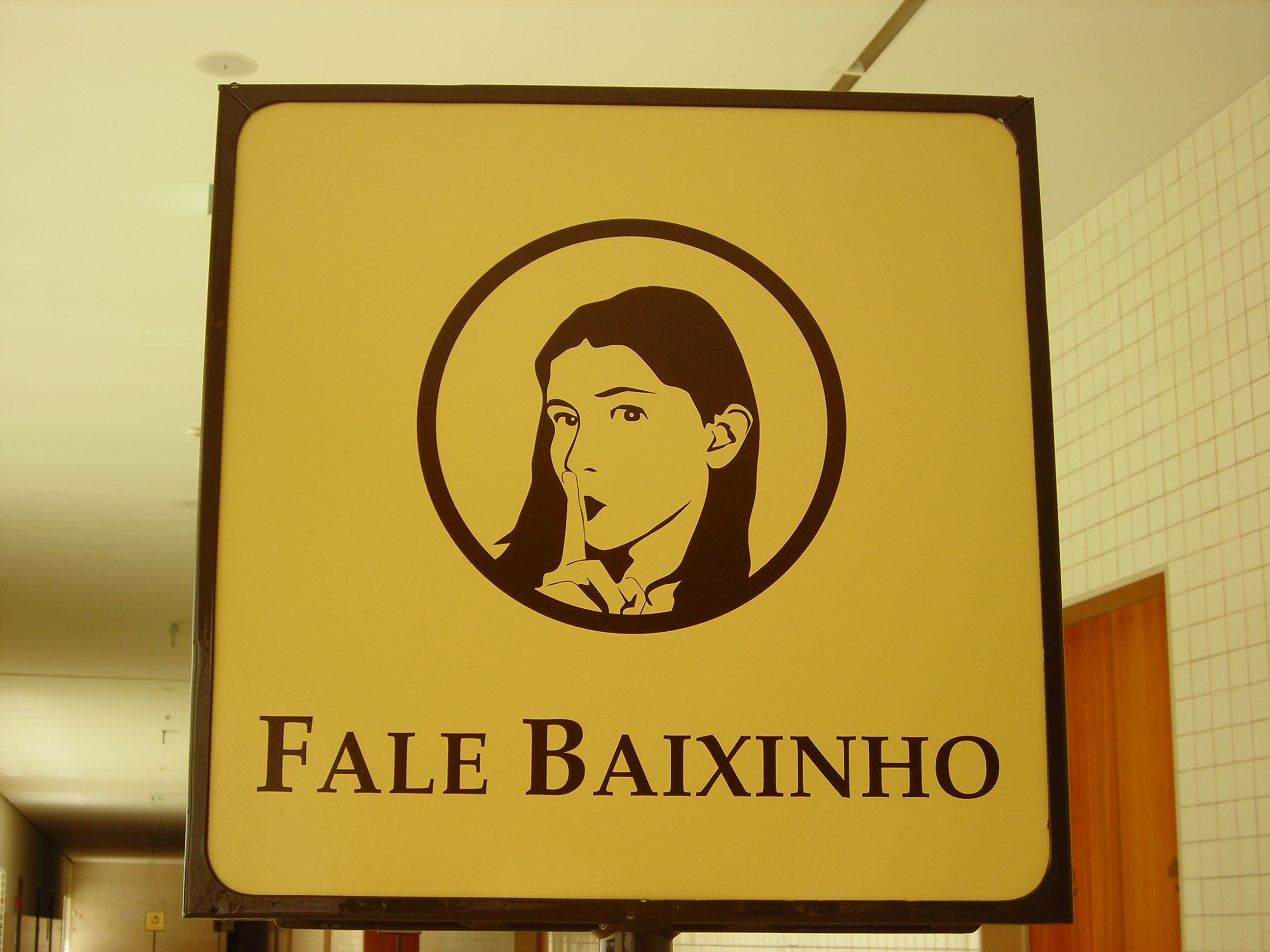 Santuário de Fátima